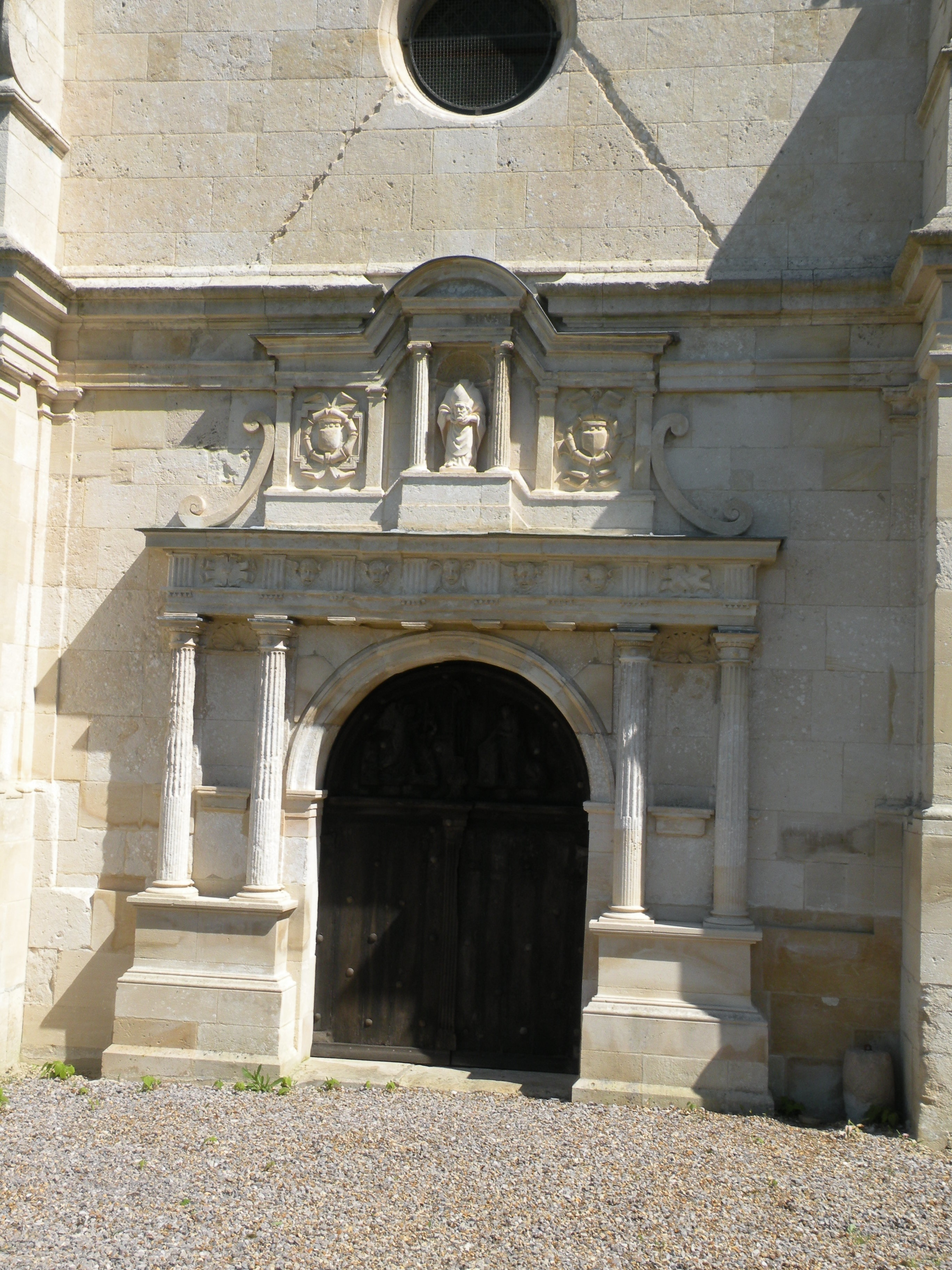 portail de l'église